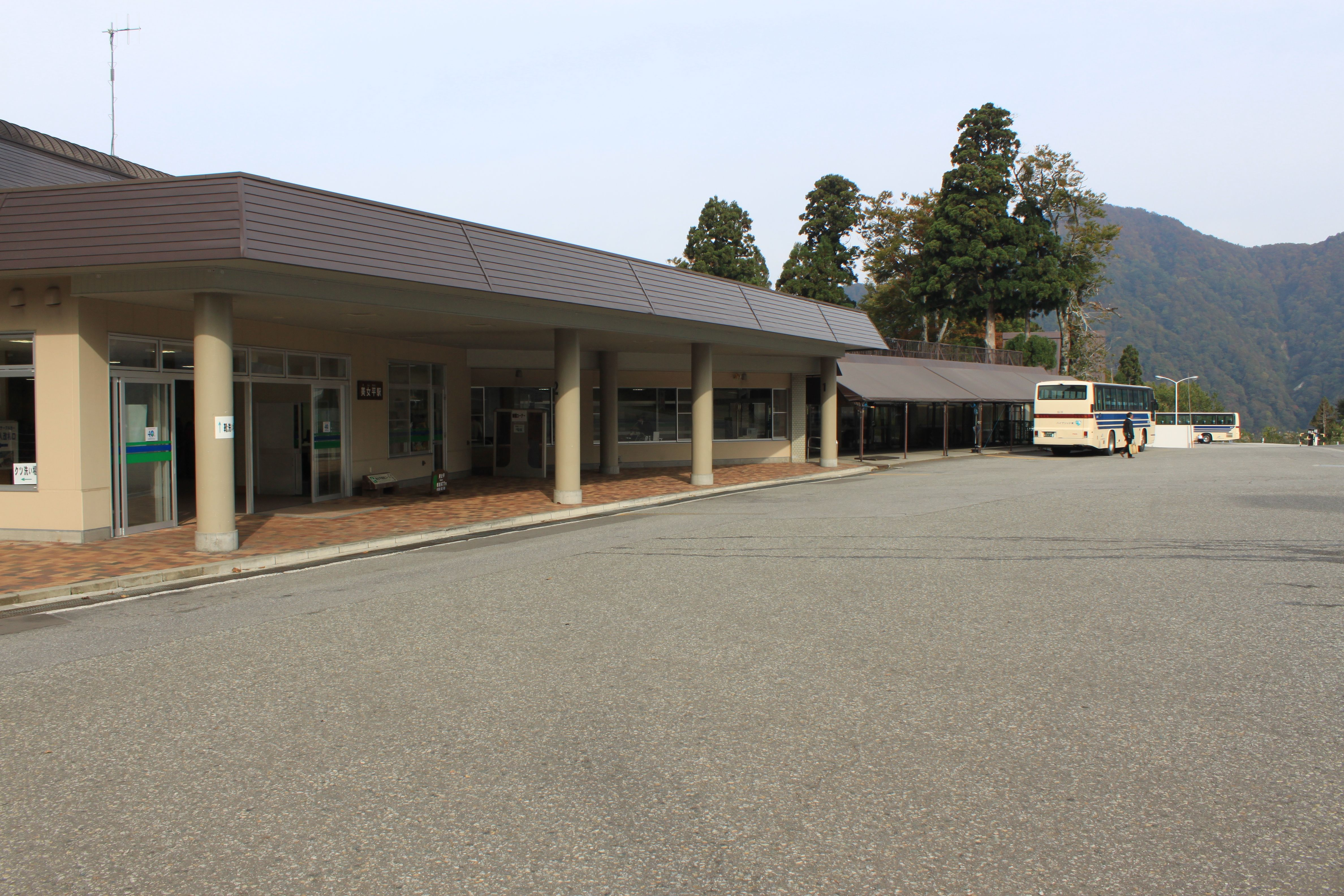 美女平駅